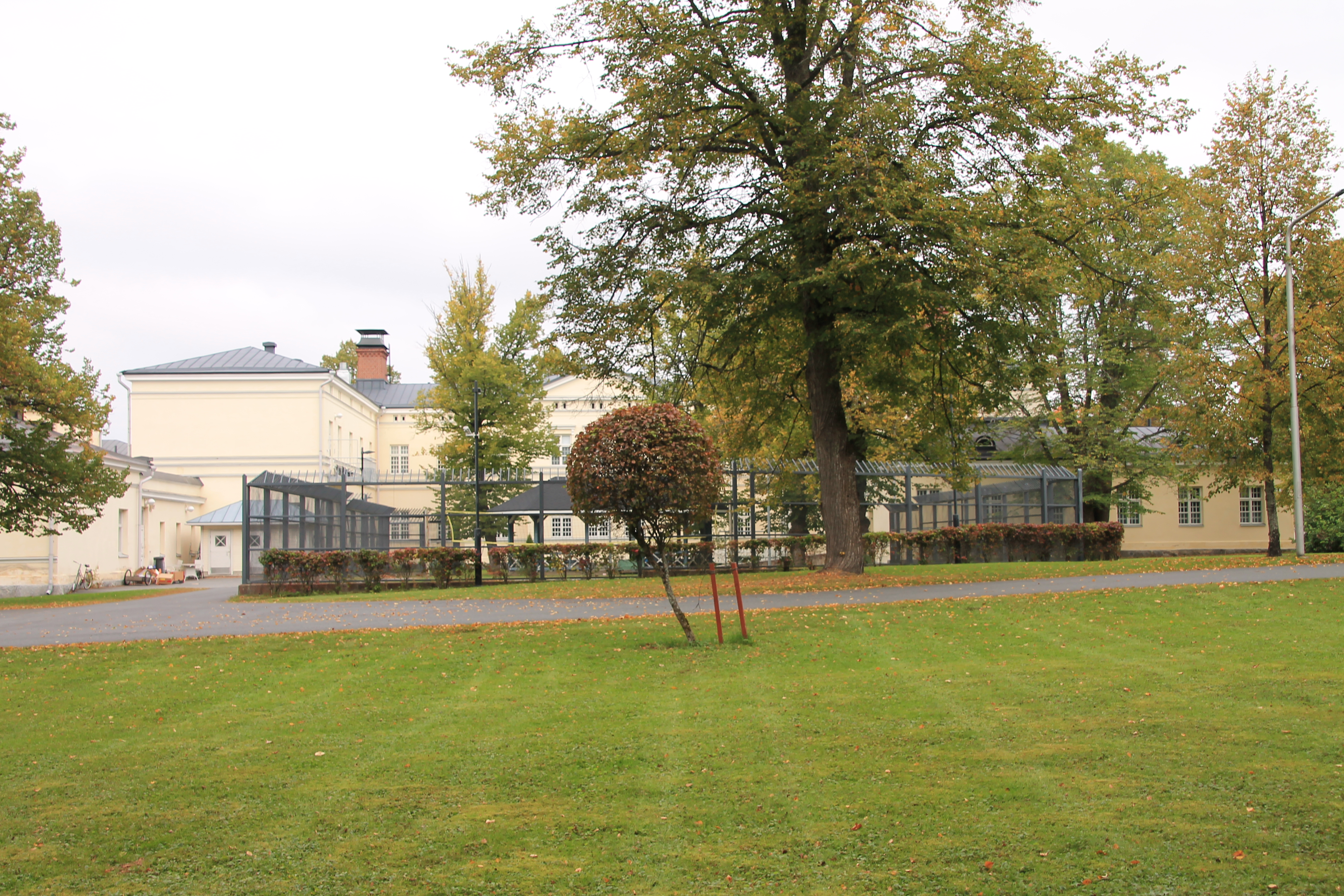 Niuvanniemen sairaalan suljettu ulkoilualue.